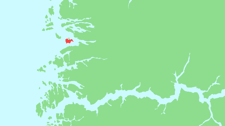 Locator map of Svanøy, Sogn og Fjordane, Norway